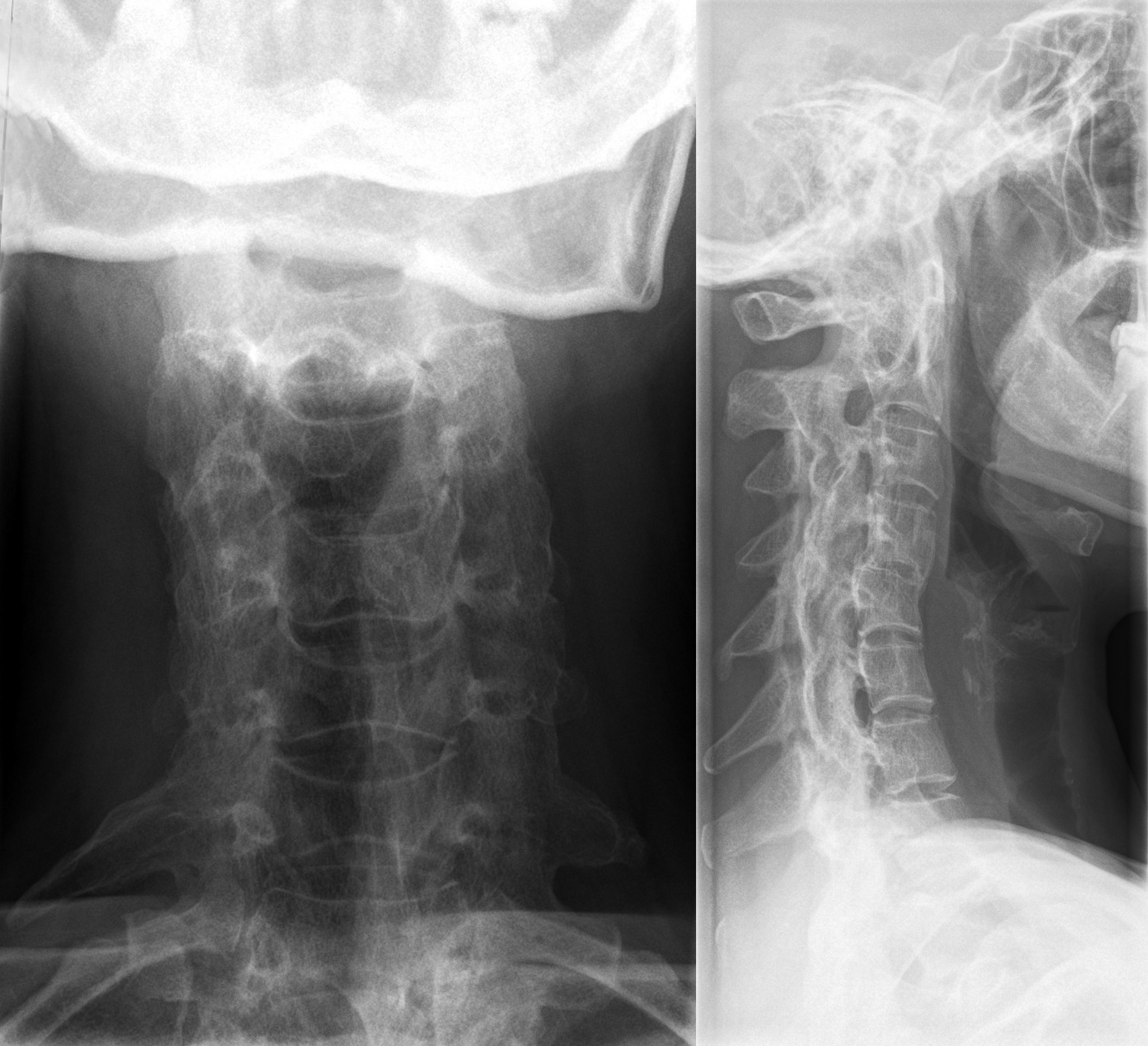 Ankylosen der Halswirbelsäule bei einer ca. 40-jährigen Frau. Anamnestisch traten Beschwerden in der späten Jugend auf, so dass am ehesten von einer abgelaufenen juvenilen Arthritis auszugehen ist. Das Bild wäre auch passend. Aktuell keine Beschwerden, die auf eine aktive Arthritis hindeuten. Die Versteifung schließt das Hinterhaupt und das Atlantoaxiale Gelenk mit ein. Nebenbefundlich Halsrippe rechts.